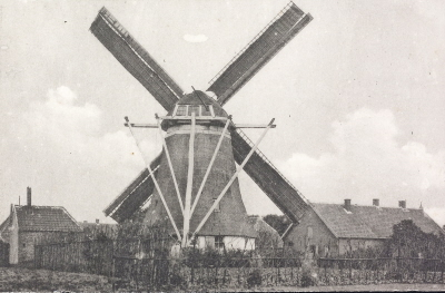 Molen Onze Rika te Bennekom met zeilen op de wieken van achteren gefotografeerd. In de novemberdagen van 1944 was er een Duits wapendepot in de molen gevestigd. Op 23 november vernietigde een explosie de Bennekomse molen